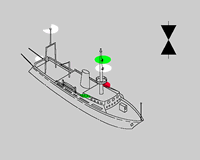 Navigation light /Luces de navegación